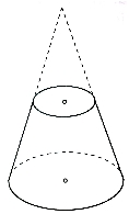 Zrezaný kužeľ